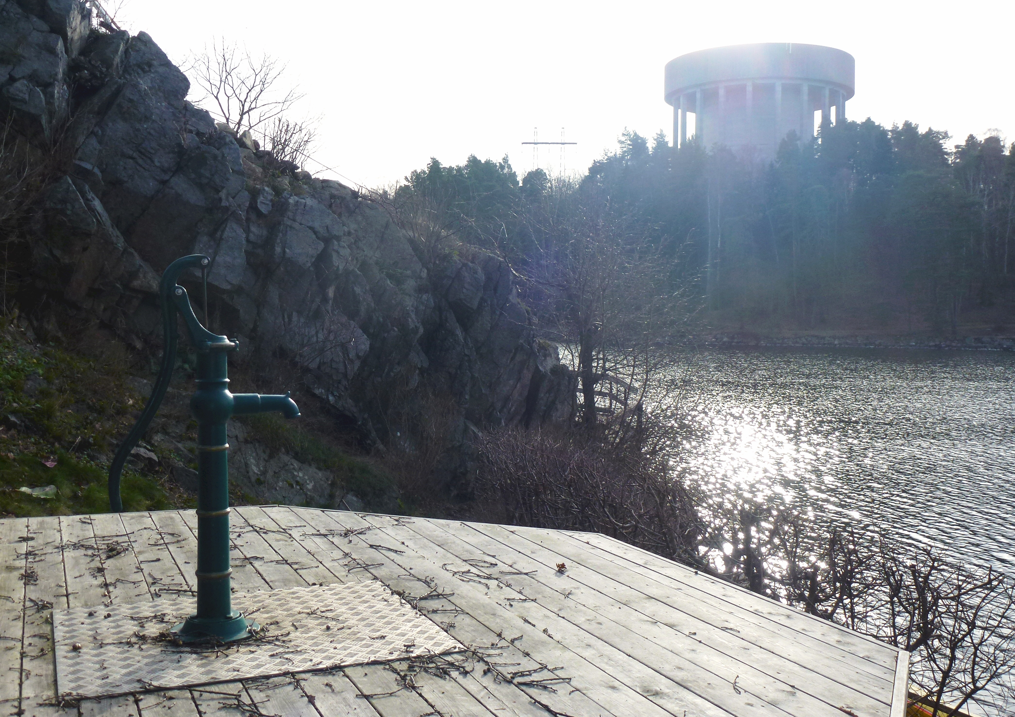 Inverness källa vid Stocksundet